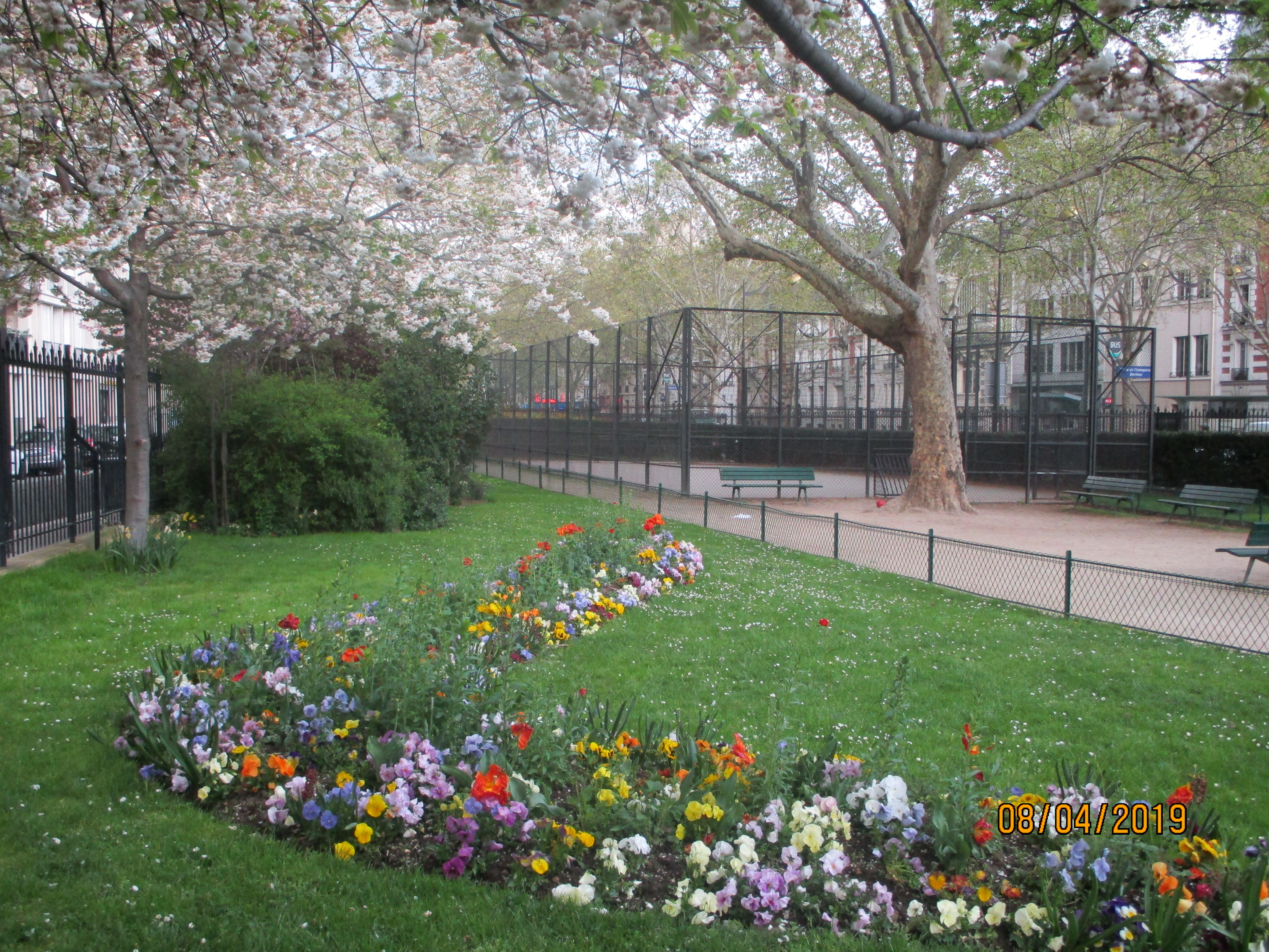 Square Jérôme-Bellat, Paris XVIIe.